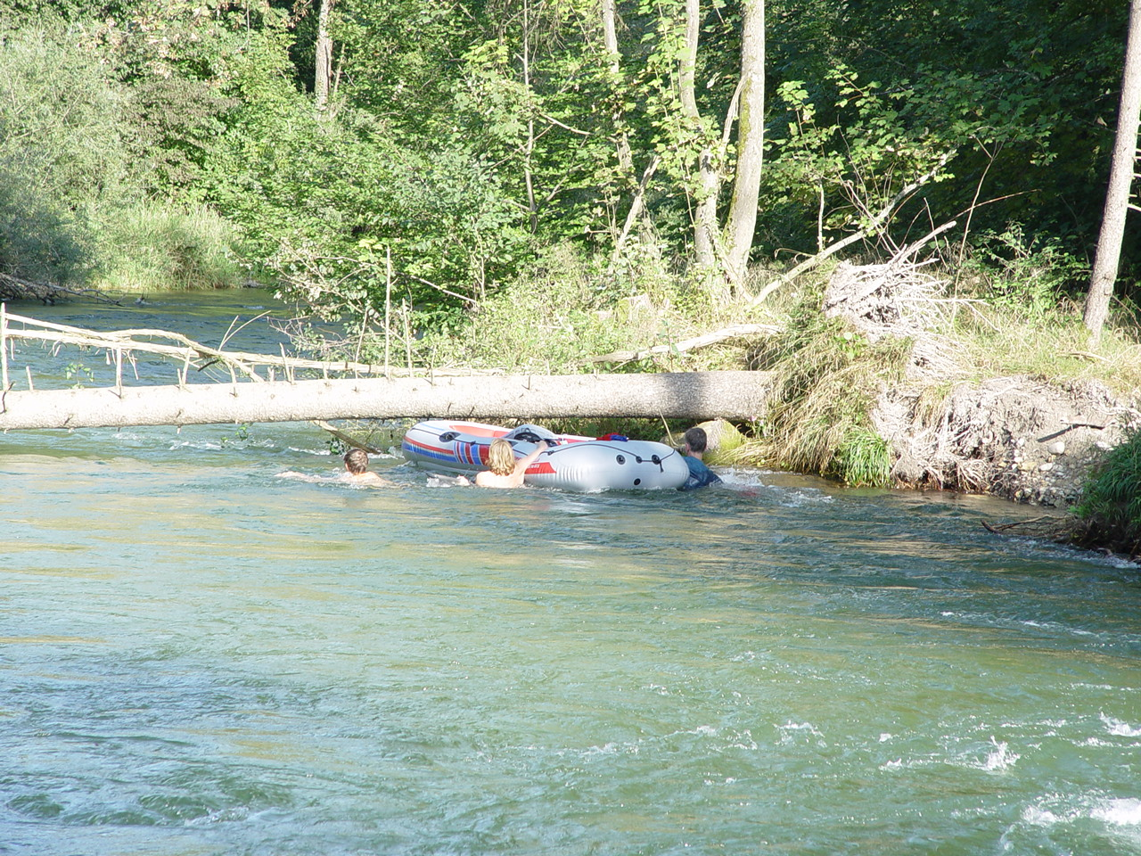 Das lebensgefährliches Hindernis links der Alzinsel bei km 51,5 ist inzwischen beseitigt